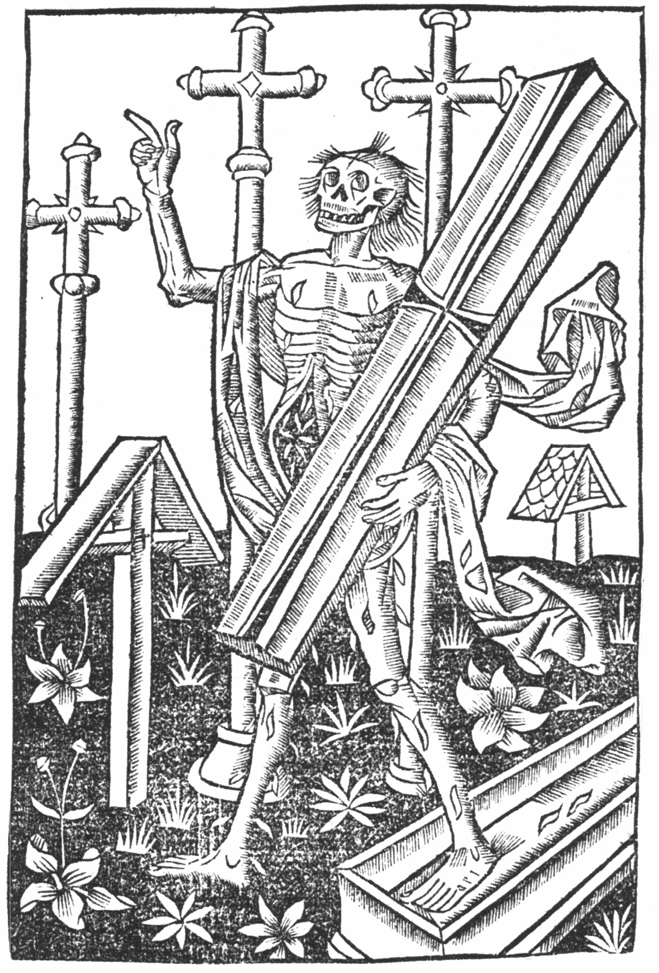 Un muerto viviente se levanta de su tumba, incunable del siglo xvi (facsímil). Original en la Bayerische Staatsbibliothek München, 2 Inc. c. a. 3893, fol. h.ii.